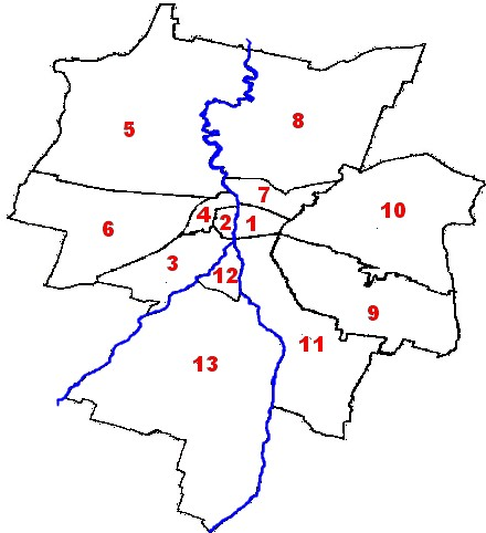 Suddivisione dei quartieri di Parma. In blu sono raffigurati i torrenti Parma e Baganza